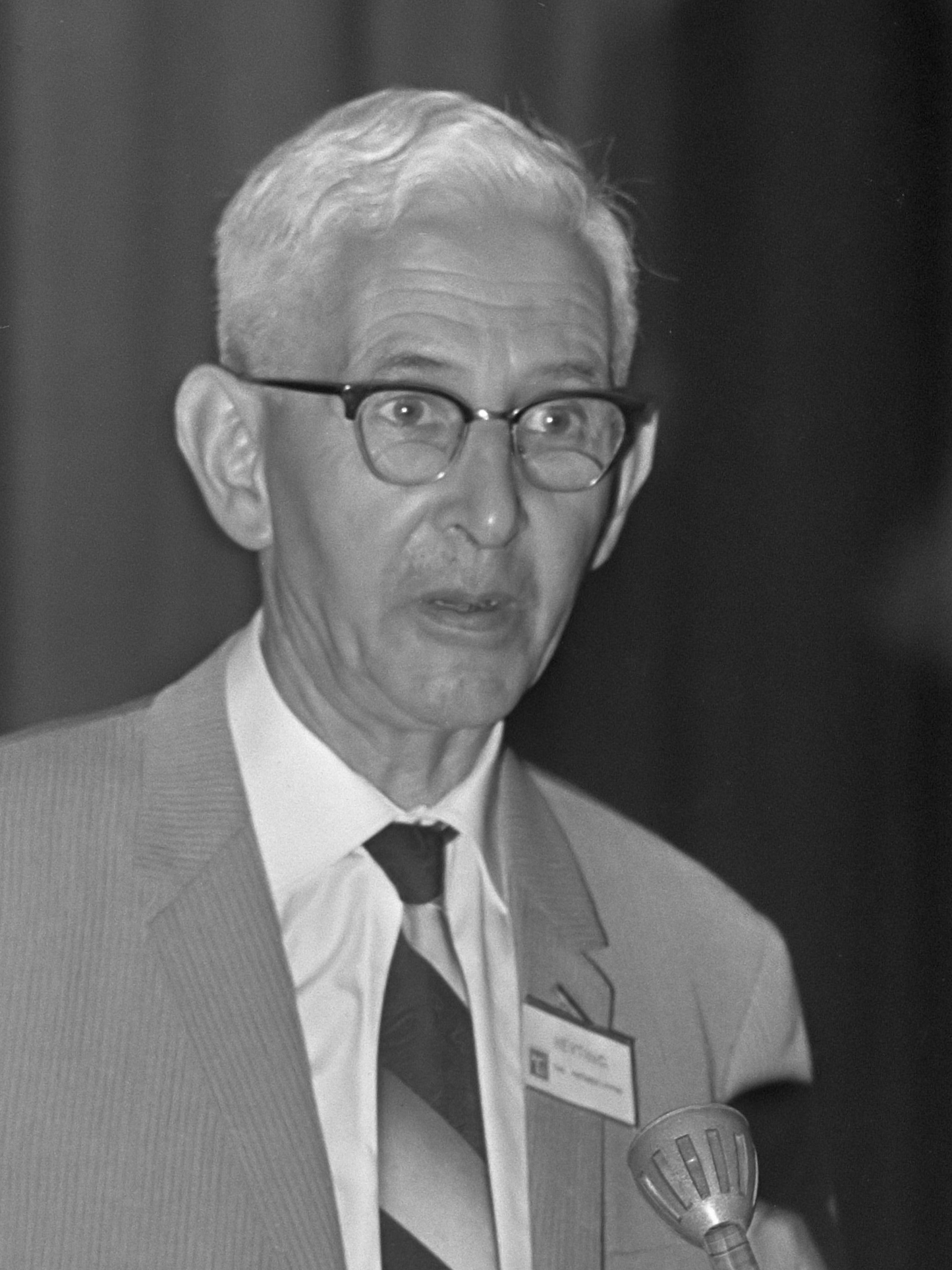 Derde Internationaal Congres for Log. Methodology and Philosophy of Science in Kras. Nummer 17 Professor A. Heyting 25 augustus 1967